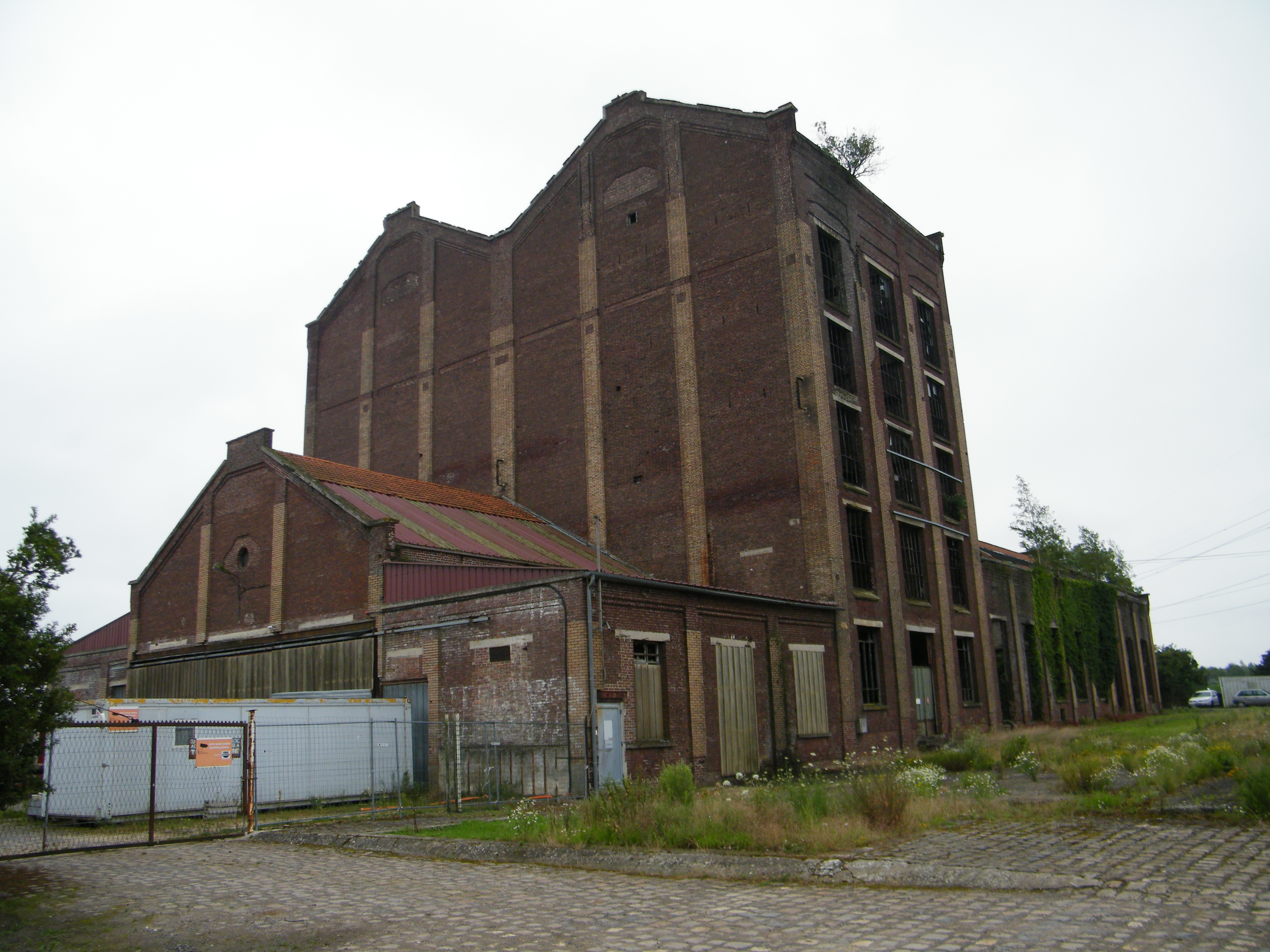 Sucrerie à Fresnes-Mazancourt, Génermont.